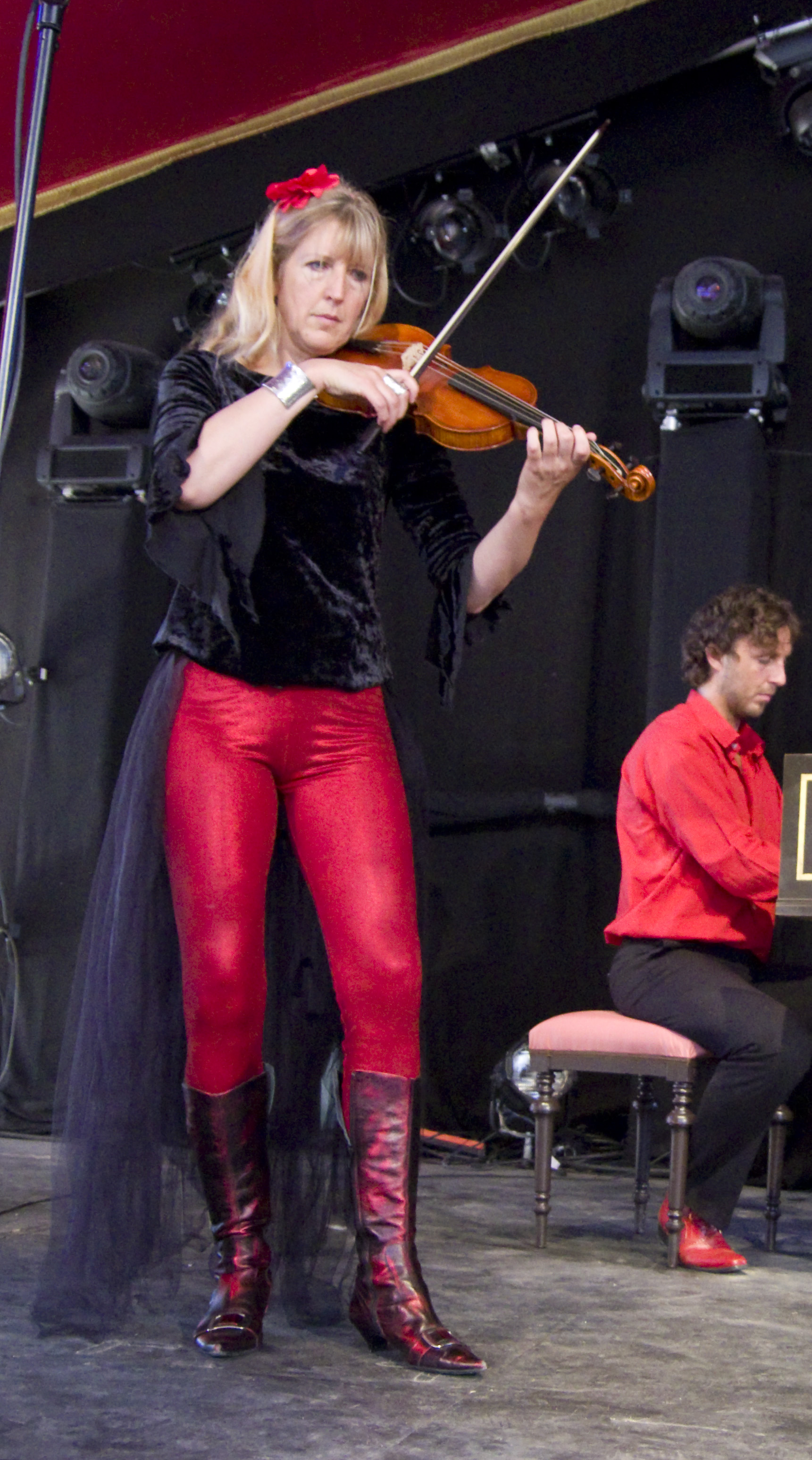 Das Zelt-Musik-Festival 2015 in Freiburg im Breisgau. 19.07.2015 Red Priest